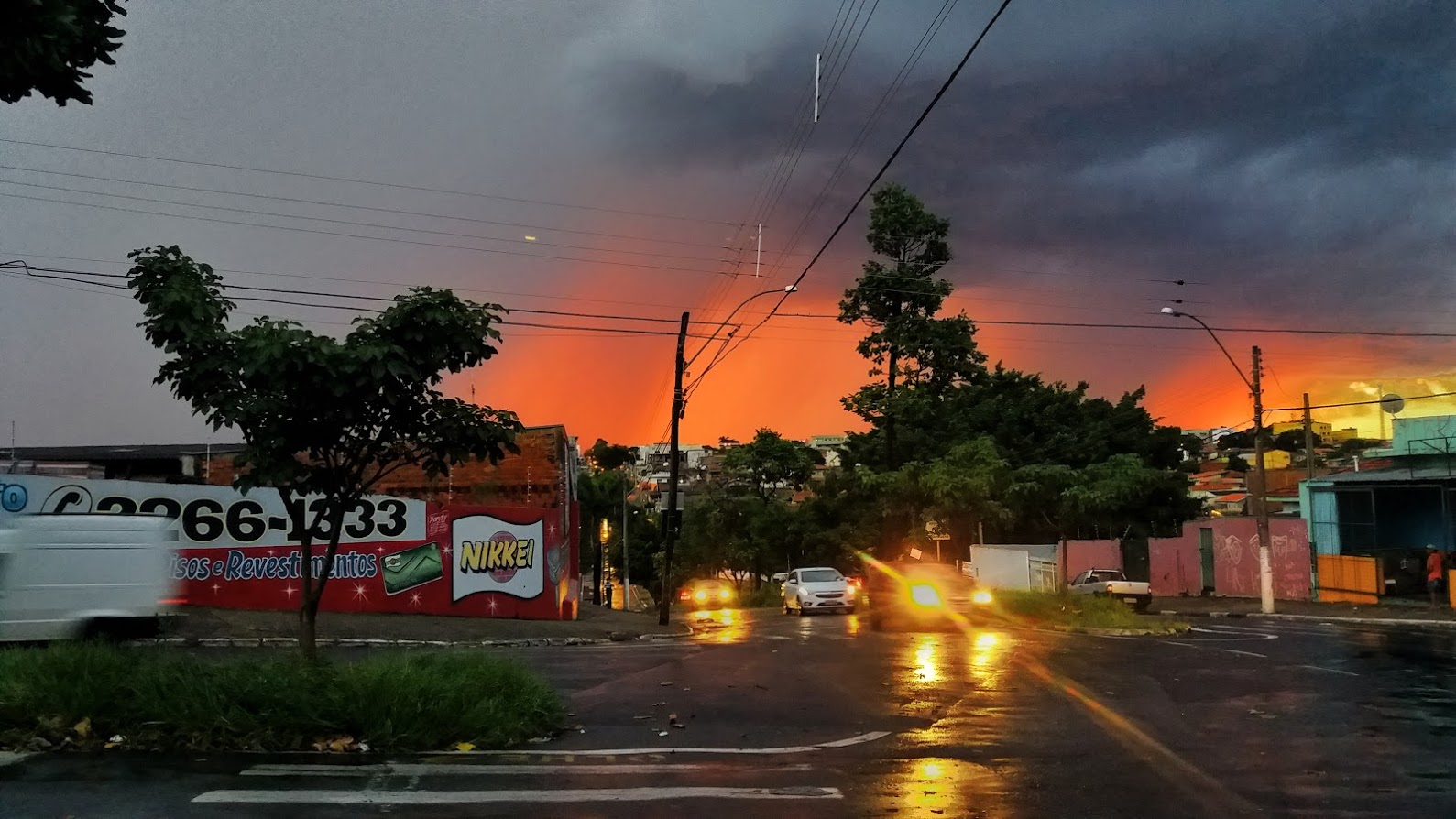 Cruzamento da Avenida Itamarati com a Avenida Jacaúna. Fev/2019